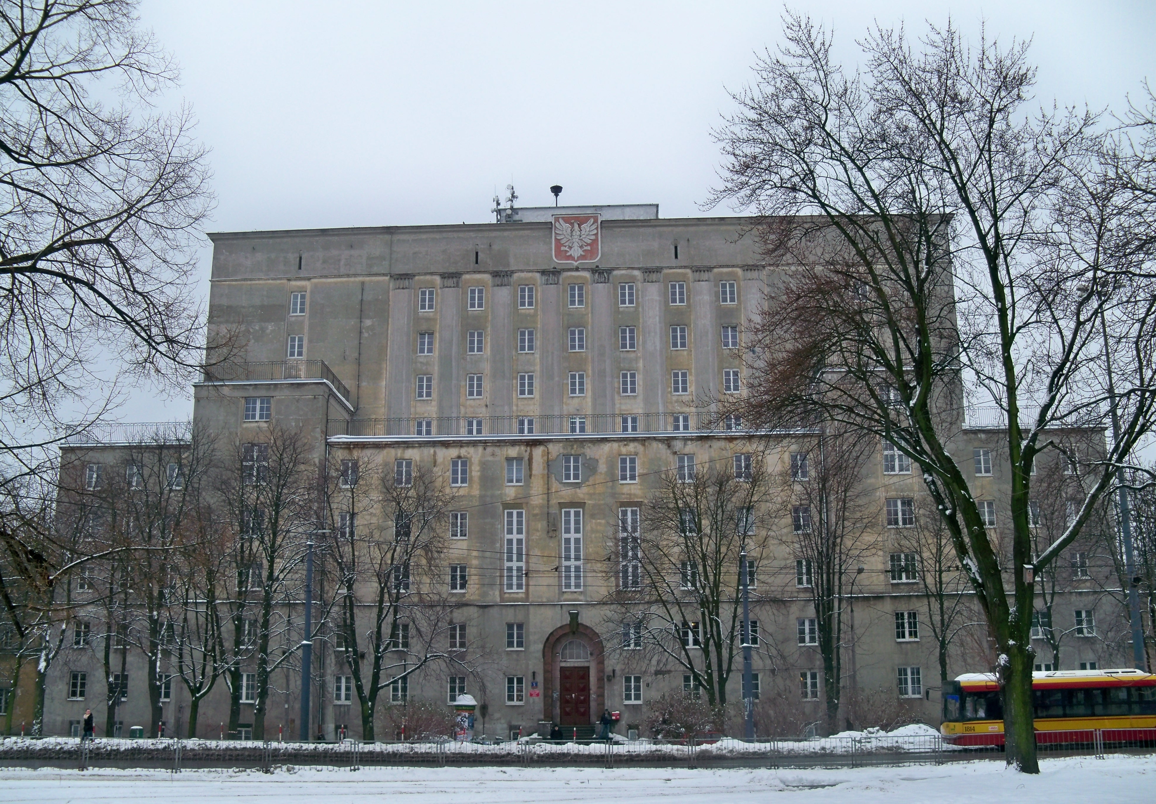 Dom Studencki Politechniki Warszawskiej "Akademik" (potocznie zwany "Alcatrazem"). Ulica Akademicka 5 w Warszawie. Widok z placu Narutowicza.